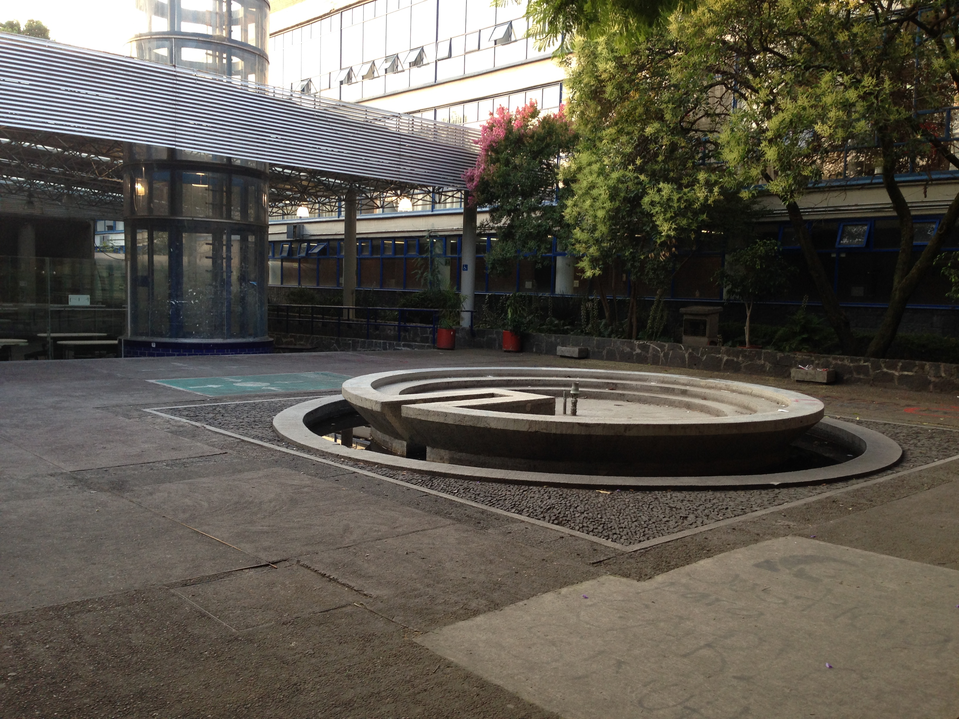 Espacio de convivencia en la FFyL